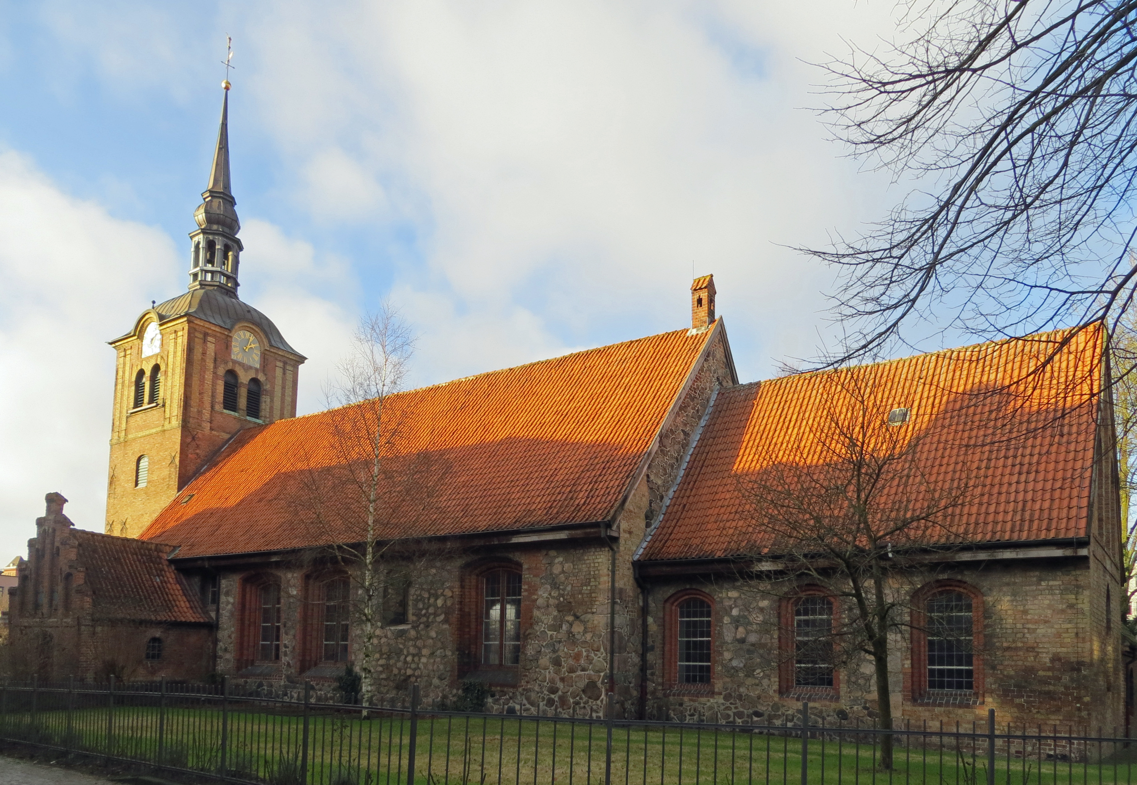 Johanniskirche, Flensburg; Bild vom 2. Januar 2013; Nachmittag